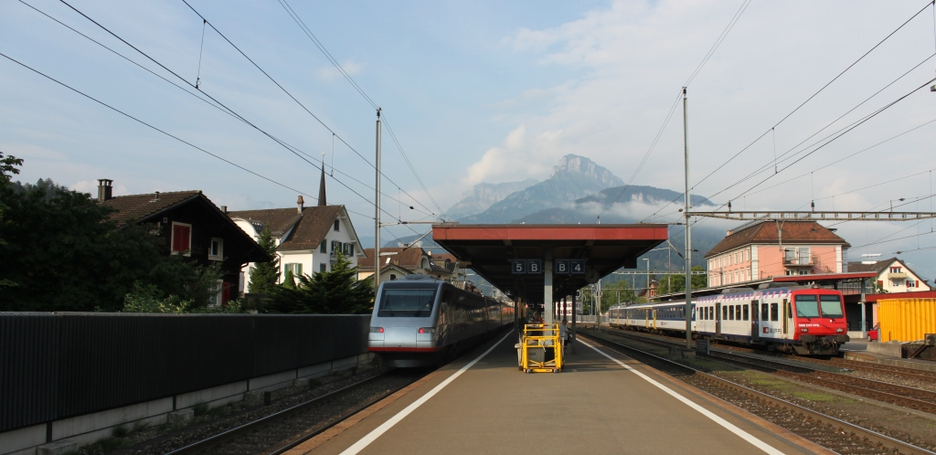 Bahnhof Brunnen mit haltender S3 und durchfahrendem ETR 470